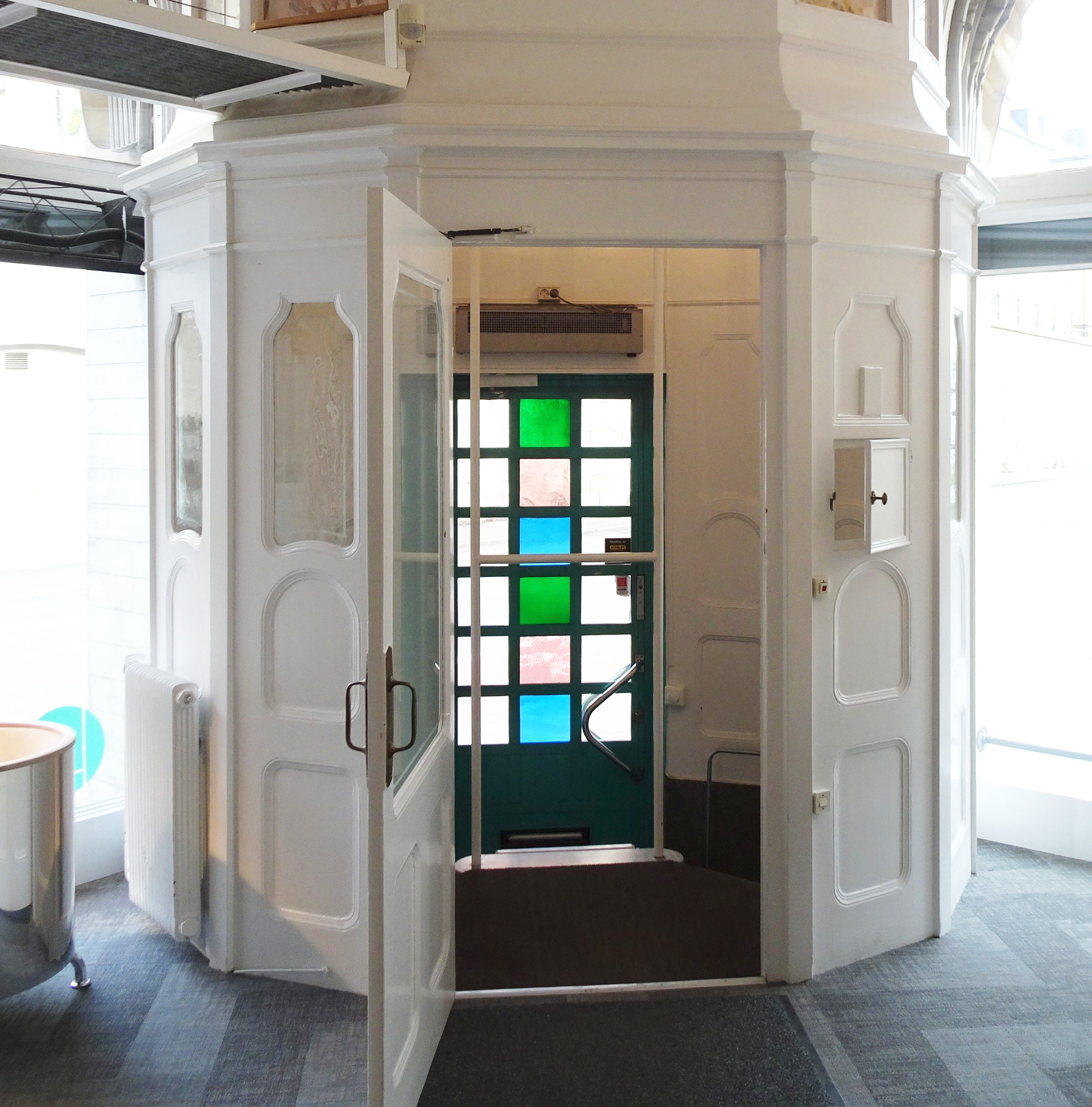 Vindfång i Apoteket Enhörningens entré